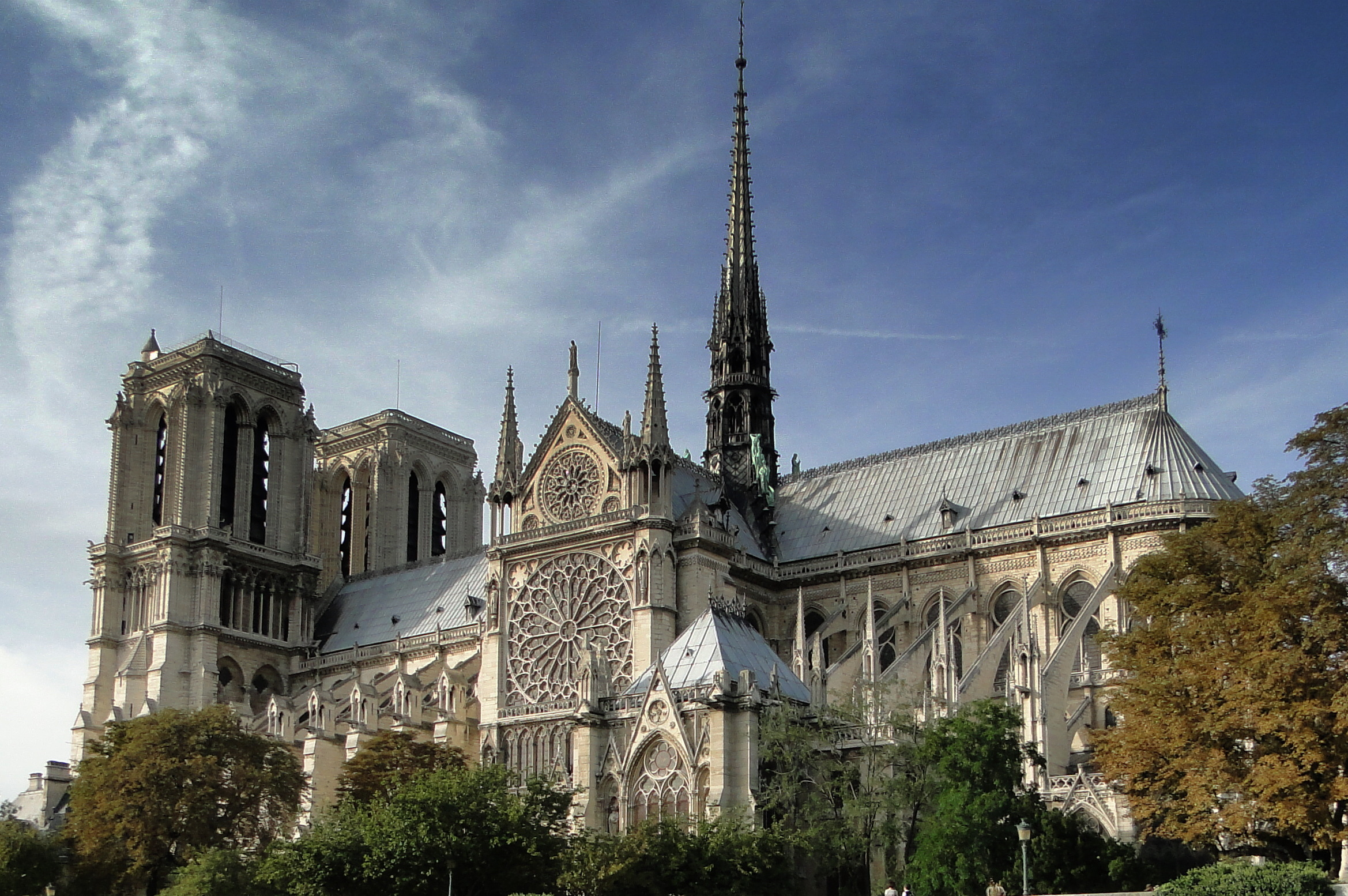 Cathédrale Notre-Dame de Paris vue depuis le sud-est .